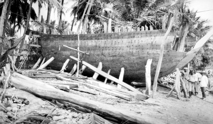 Negatief. Een Boeginese handelsprauw in aanbouw op het strand bij Ara, Boeloekoemba, Zuid-Celebes